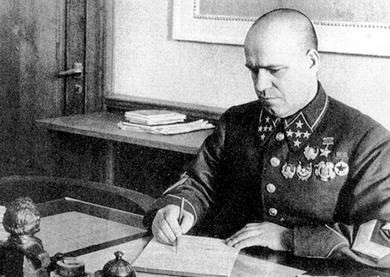 Георгий Константинович Жуков (1896 — 1974). Начальник Генштаба Красной армии. 1941 г.